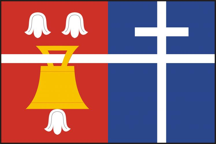 Řepníky vlajka